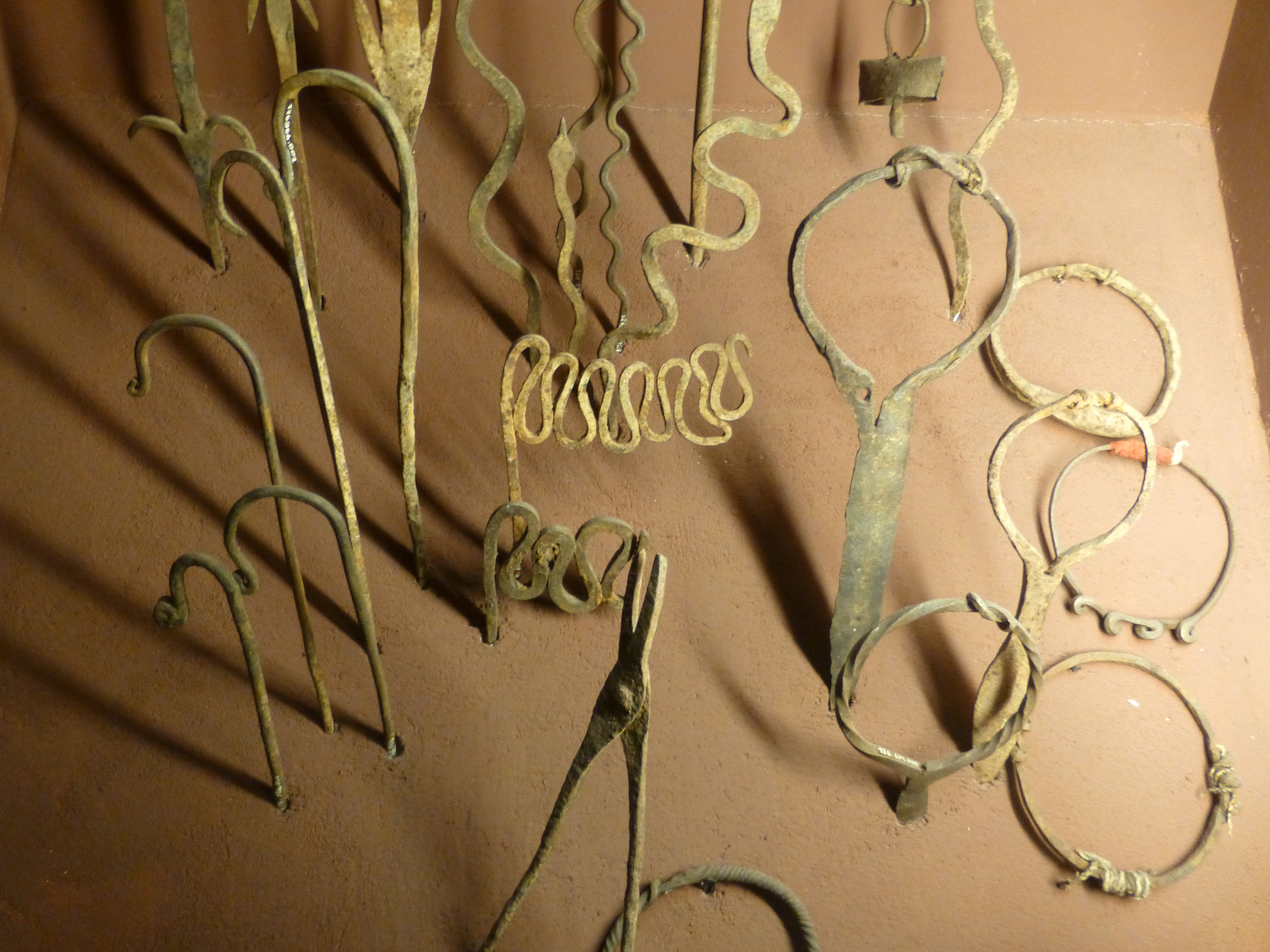 Objets rituels en fer. Installés sur un autel familial pour contrecarrer les sorciers. Ils font l'objet de libations de bière de mil (taches blanchâtres) ou de sacrifices sanglants (coulées noirâtres). Lobi. Burkina Faso/Côte d'Ivoire. Musée africain de Lyon.